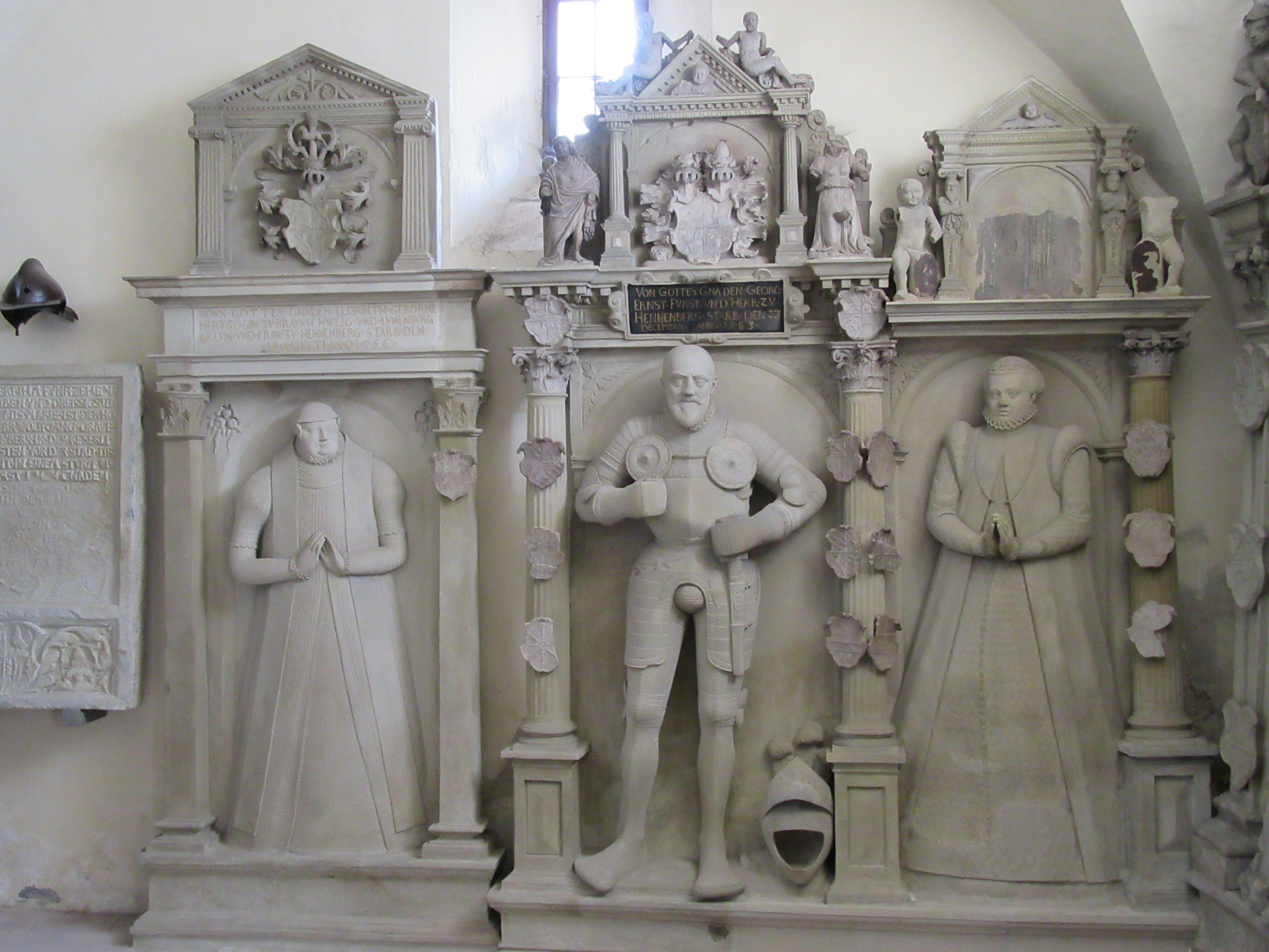 Schleusingen Johanneskirche